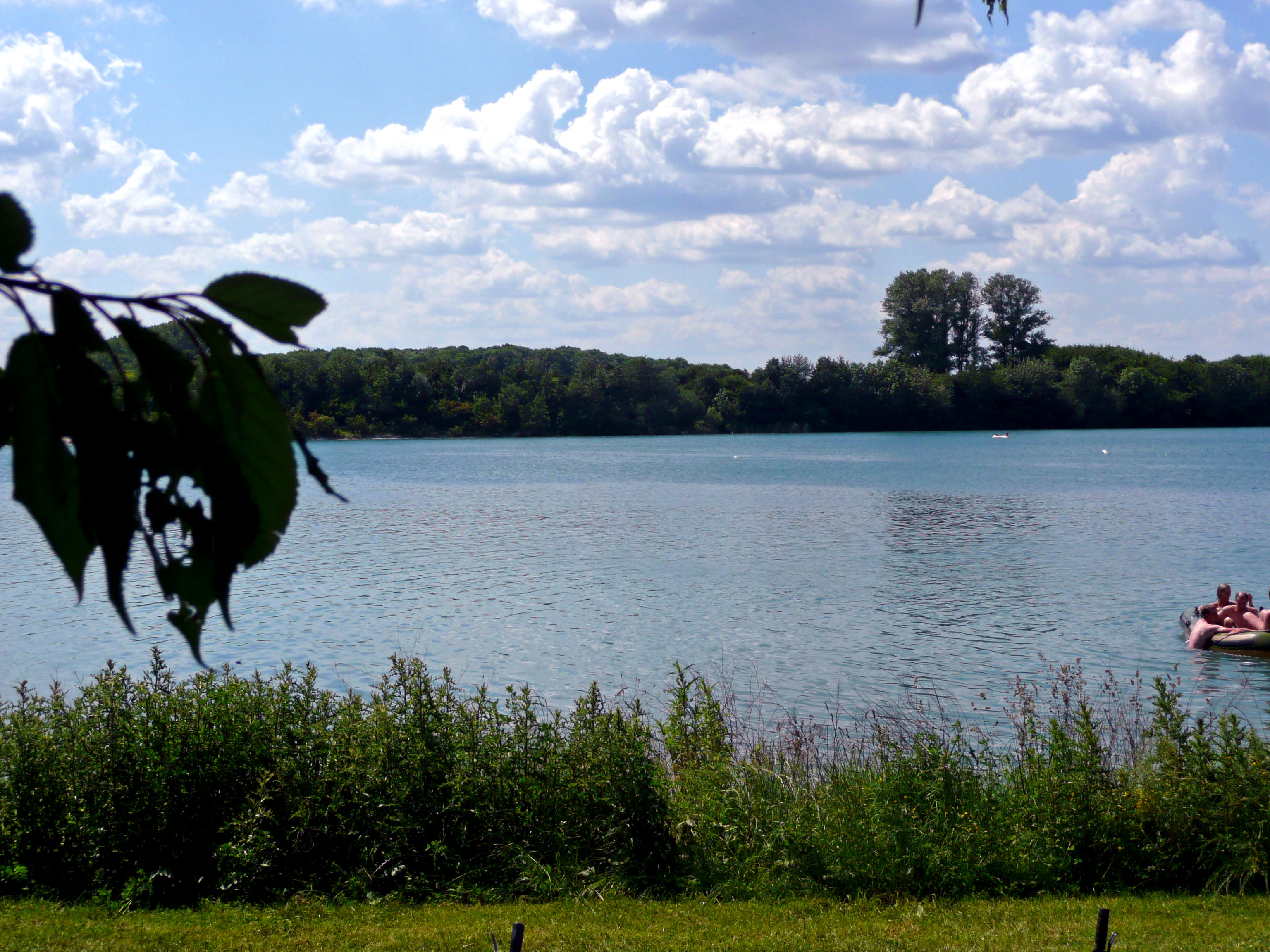 Tuttenbrocksee Beckum